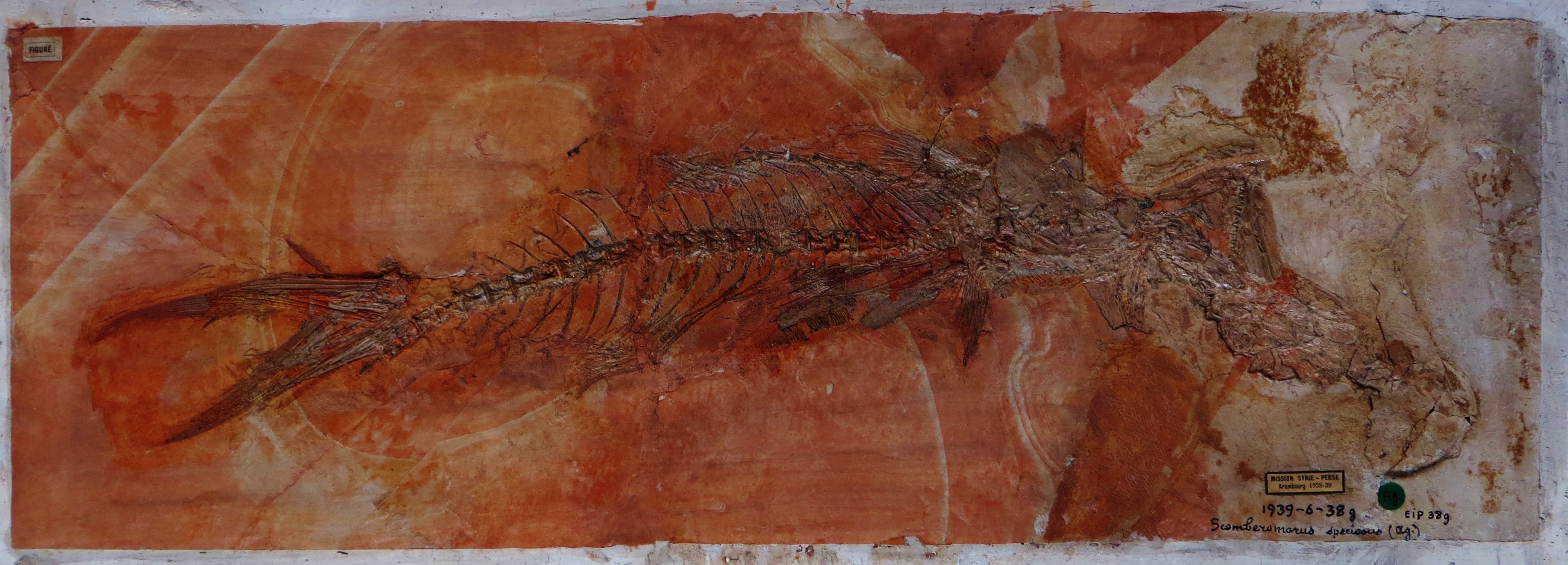 Fossil of Pseudauxides, an extinct fish- Took the photo at Musee d'Histoire Naturelle, Paris